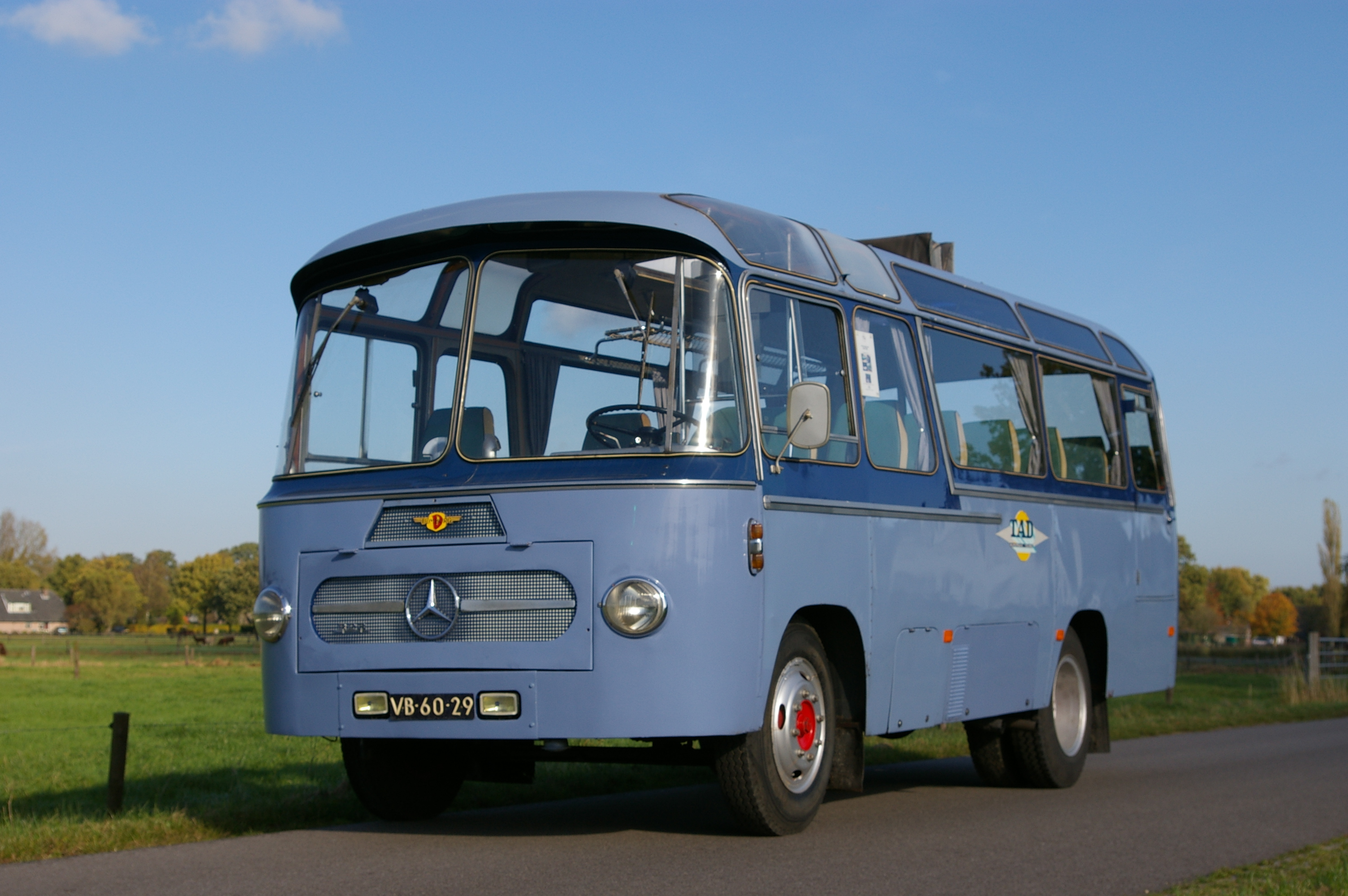 Museumbus van de Stichting Veteraan Autobussen